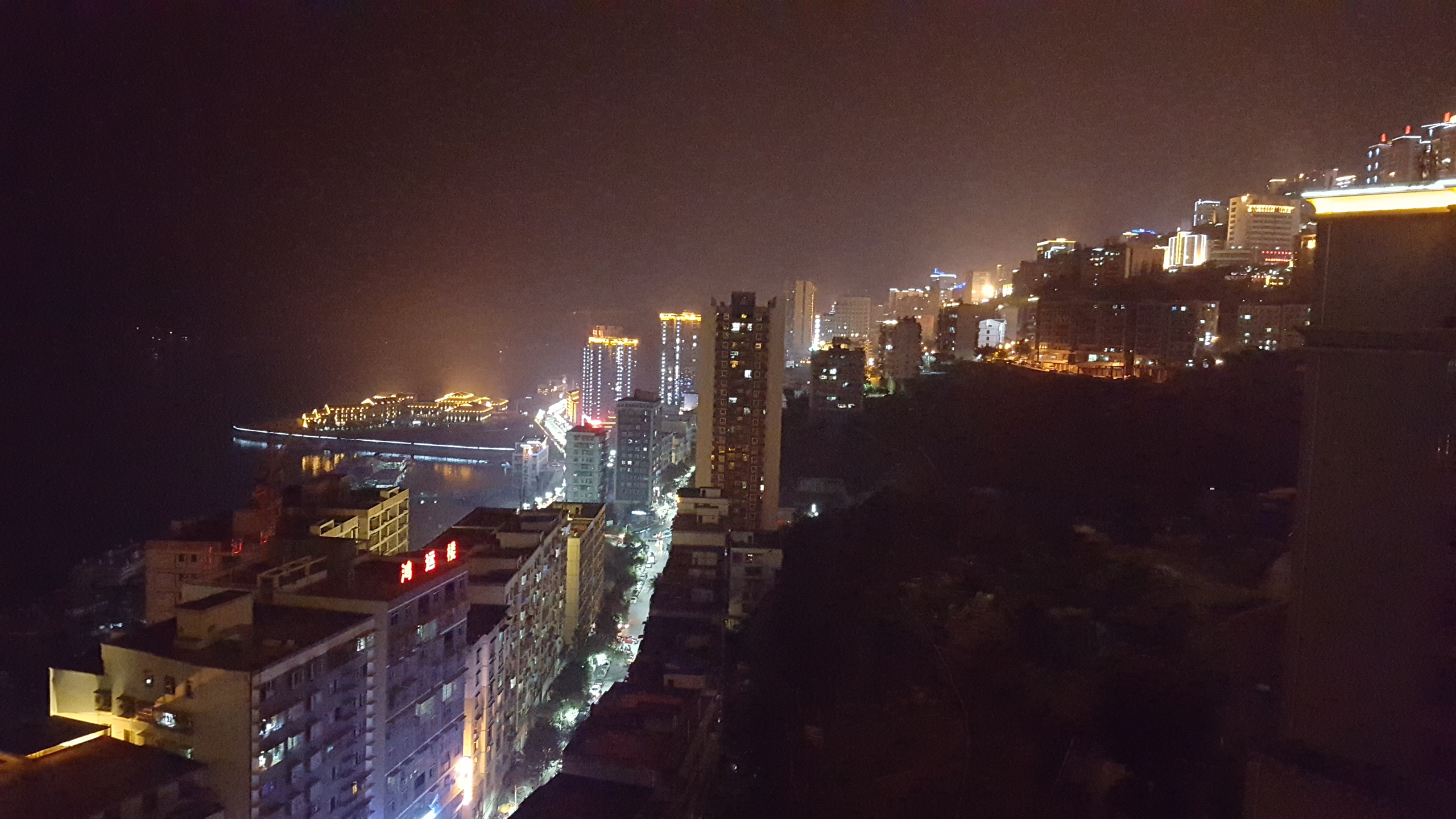 重庆市巫山县夜景